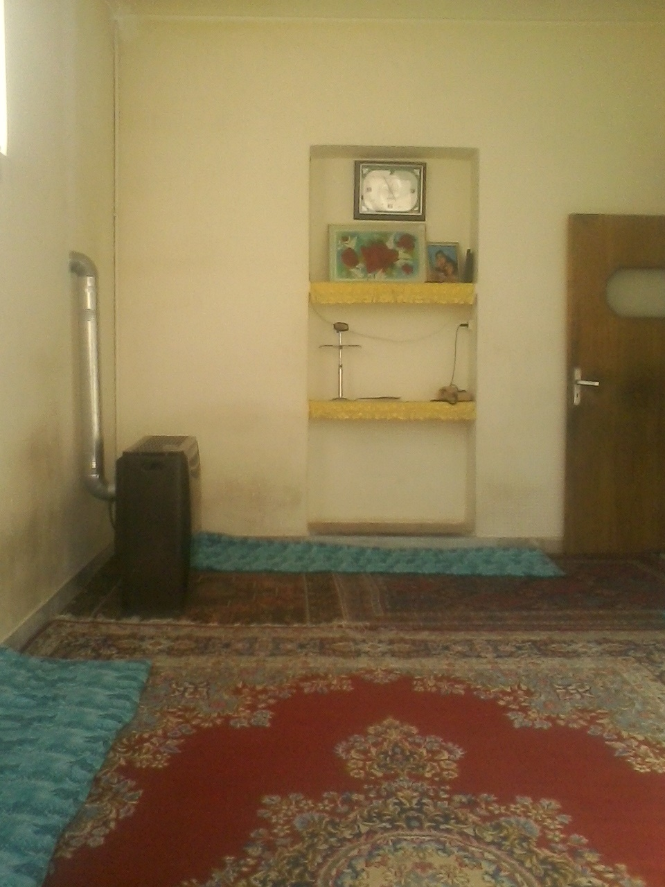 سینما و سریال